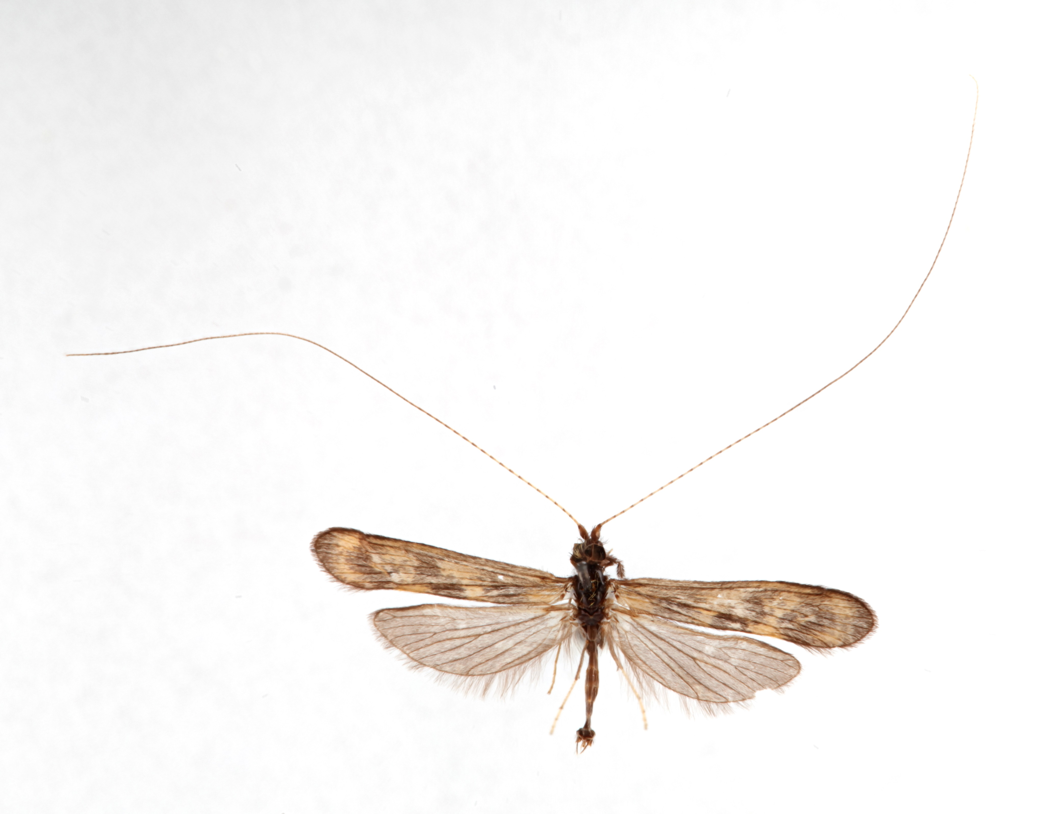 NHRS-KAJO 000003519 dors